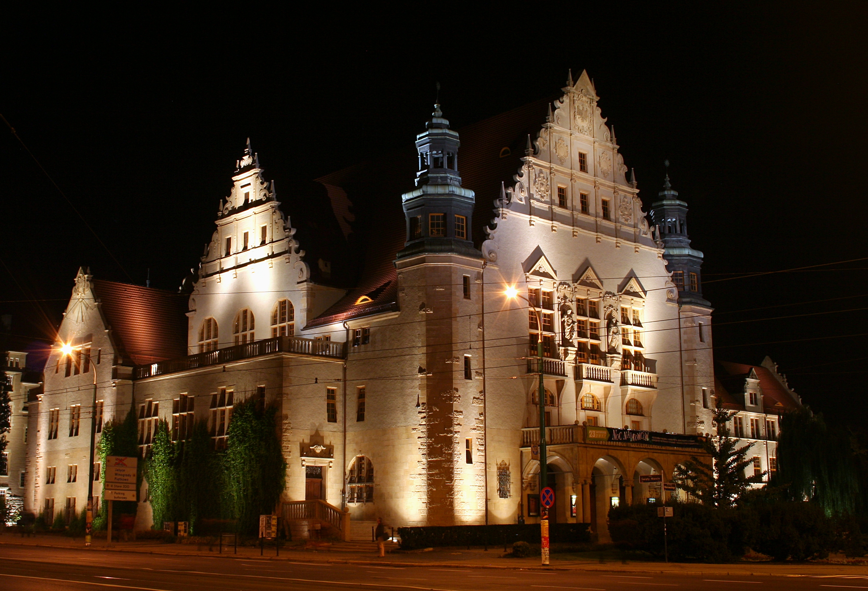 Budynek Collegium Minus w Poznaniu